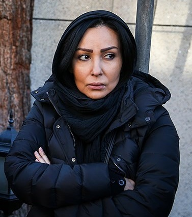 پرستو صالحی